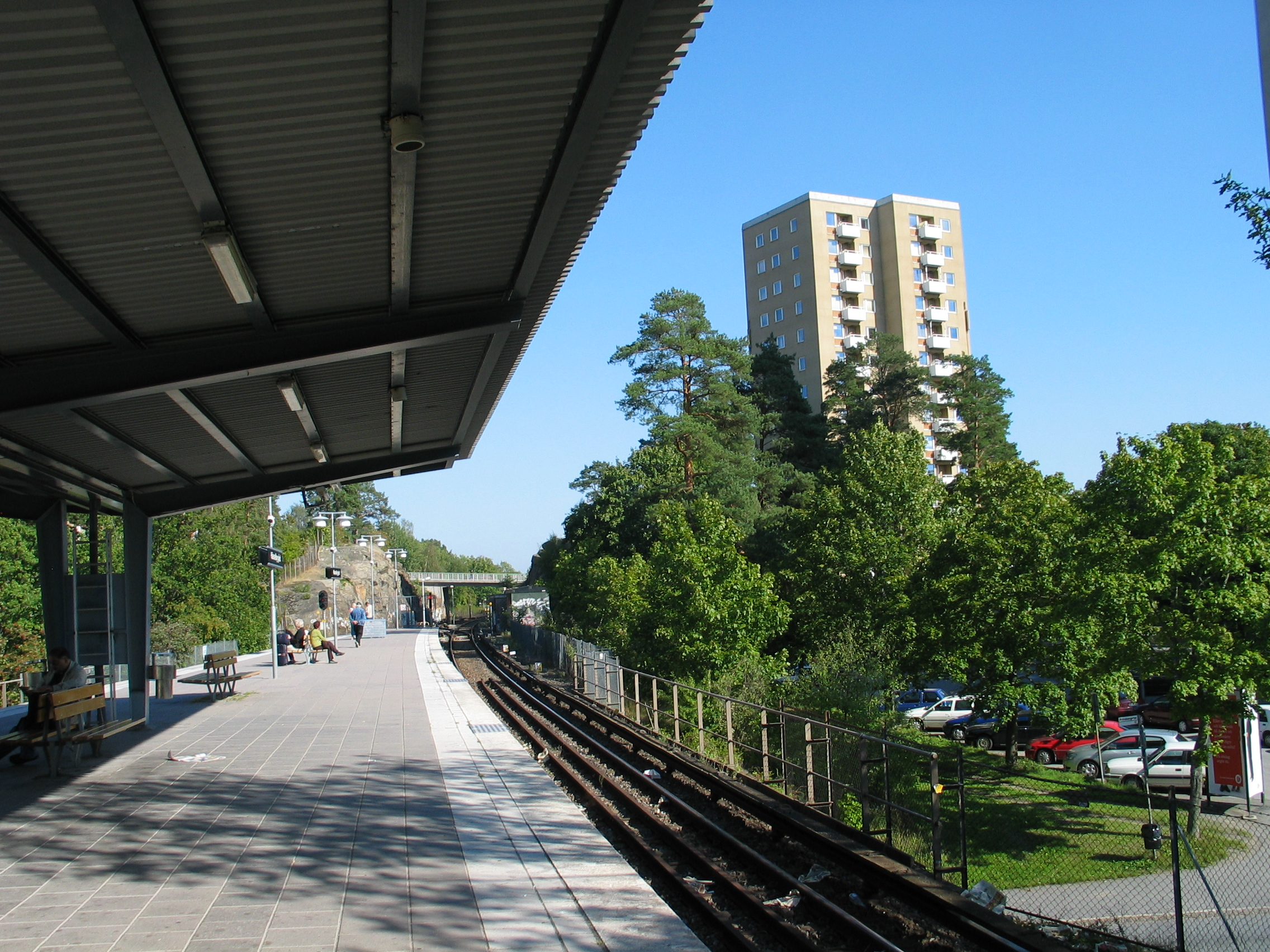 Hässelby Gård, a metro station in Stockholm, Sweden.